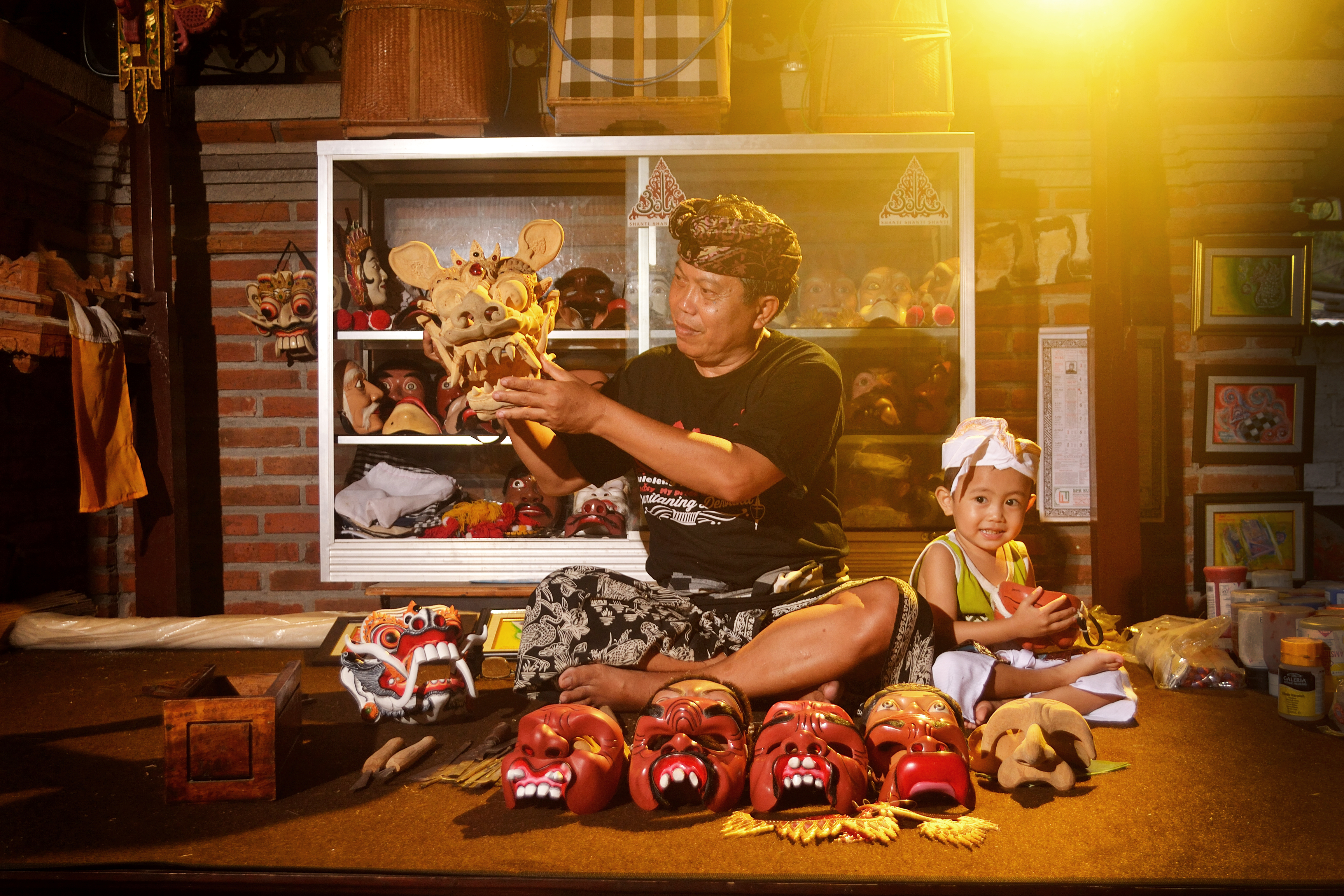 Salah satu pembuat / pengrajin topeng dan tapel barong ditemukan di Buleleng. Suasana malam, bapak ini berpakaian adat madya sambil mengukir tapel barong yang belum jadi. Yang menarik perhatian pastinya adalah jejeran topeng-topeng beragam jenis. Mulai dari tapel dengan beragam ekspresi, tapakan Rangda dan Barong, topeng Sidakarya dan Topeng Patih Gajah Mada juga terpajang di kotak kaca penyimpanan.